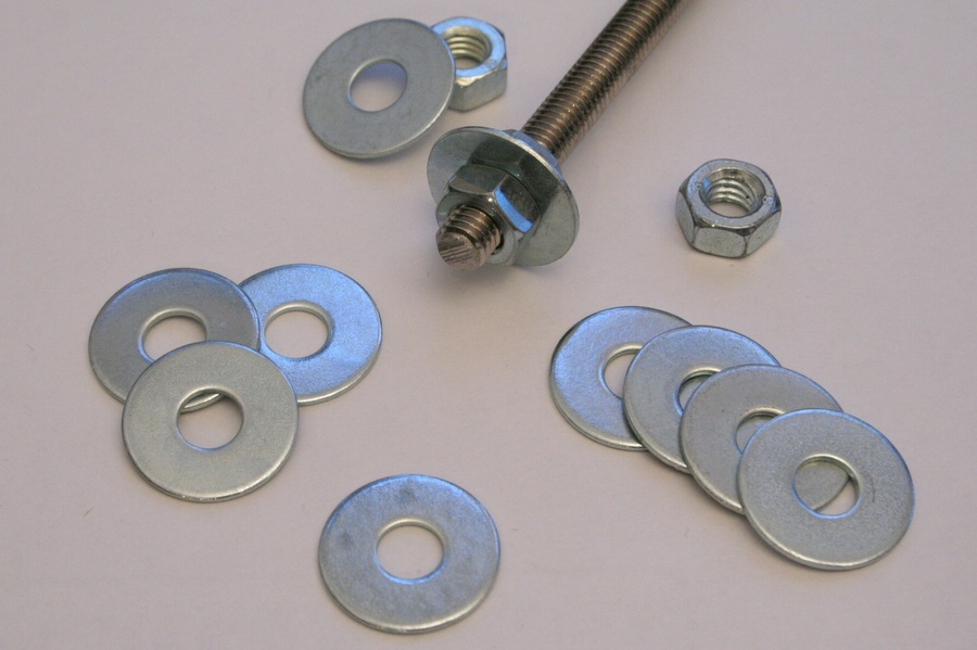 Unterlegscheiben mit Muttern und Gewindestange